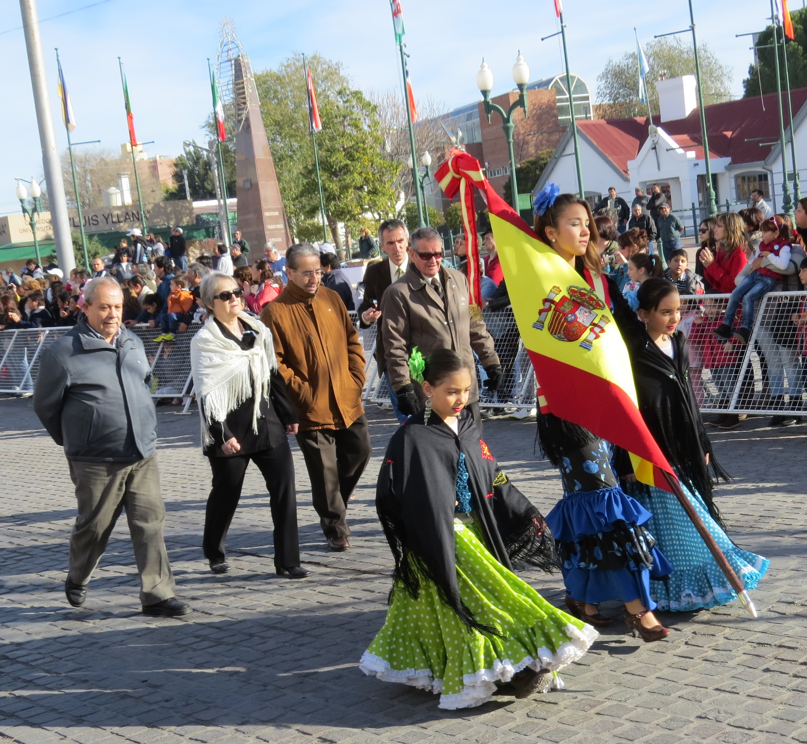 Colectividad española de Trelew, Chubut, Argentina